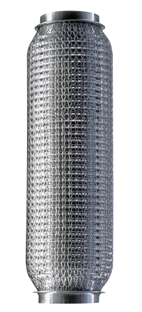 Schlauchleitung zur Bewegungsentkopplung in Abgasanlagen von Fahrzeugen